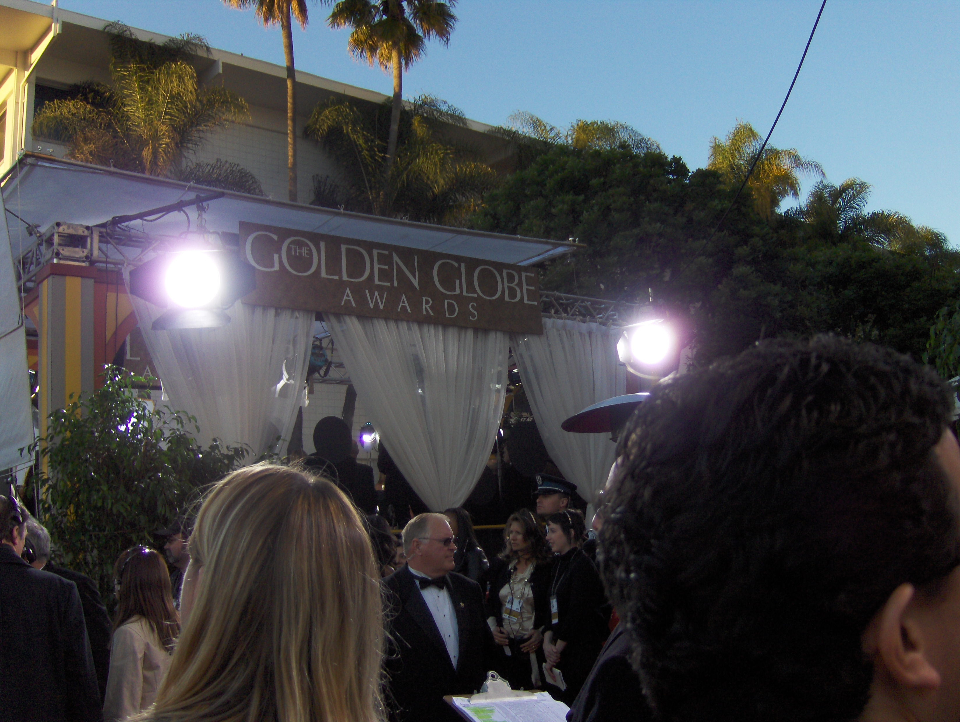 Golden Globe Awards, Los Angeles Jan 2007.